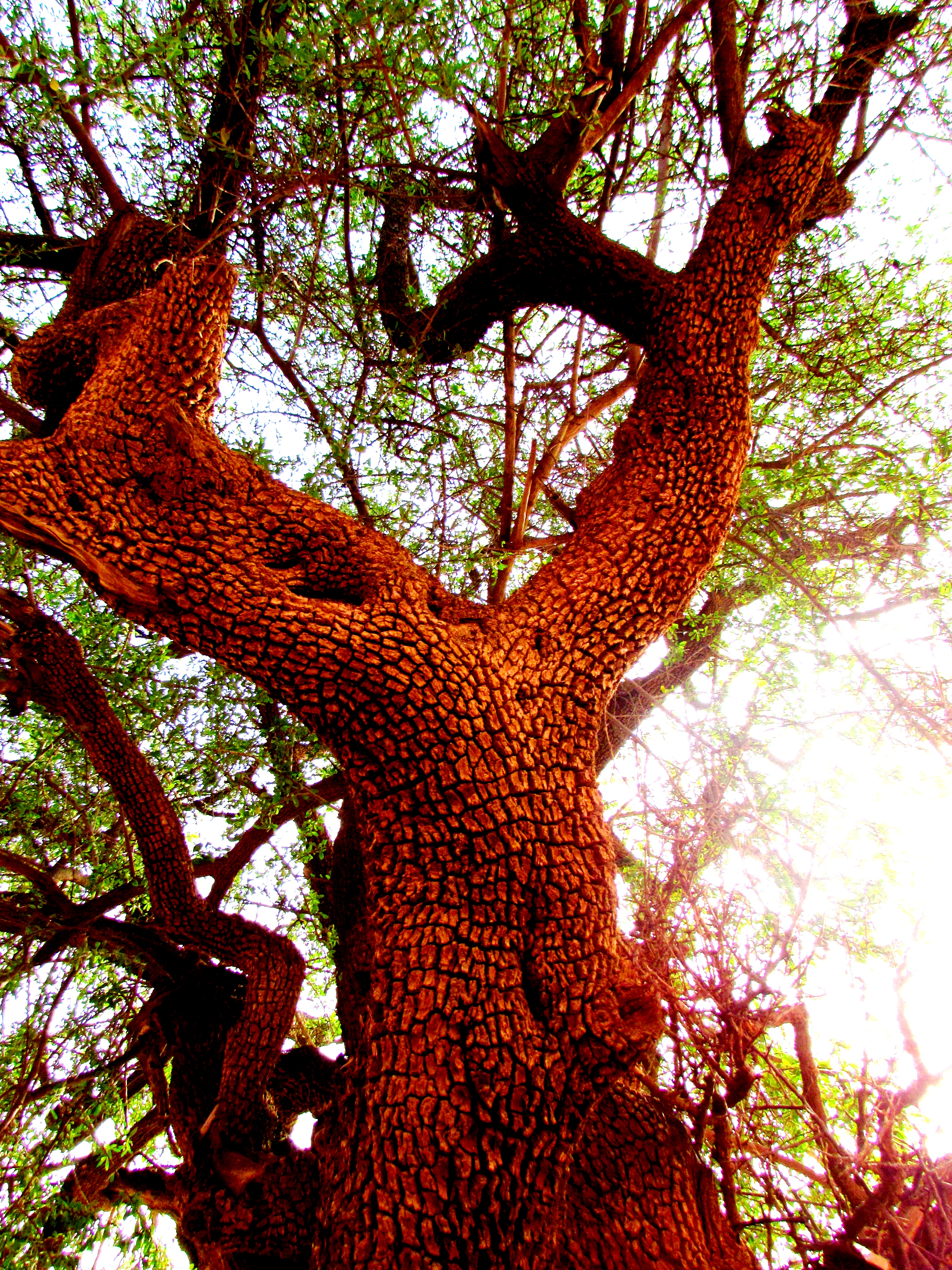 L'arbre unique du Maroc, l'Arganier "Perle du sud".